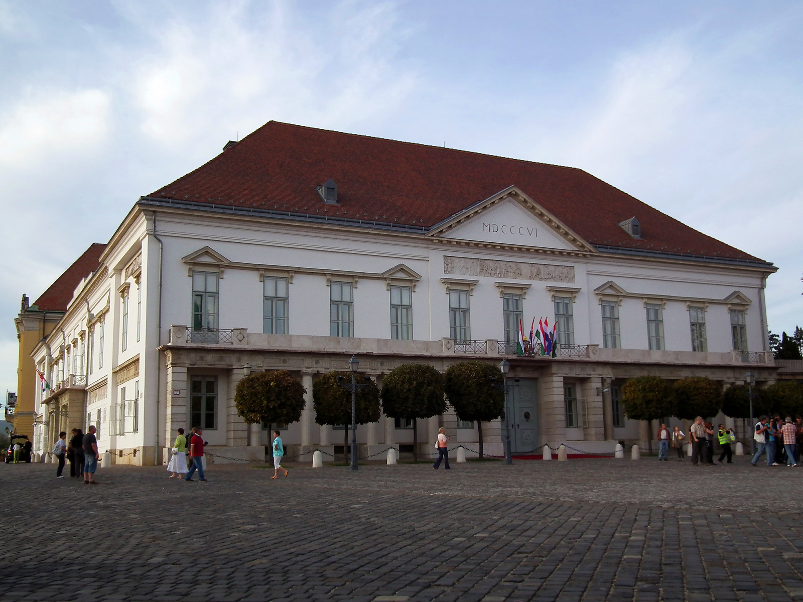 Sándor-palota (Budapest 1, Szent György tér 1-2-3., Szent György tér 1-2.) This is a photo of a monument in Hungary. Identifier: 137